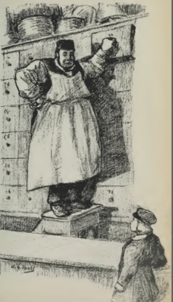 Illustration d'Henri-Gabriel Ibels (1867-1936) pour "Sébastien Roch", roman d'Octave Mirbeau (1848-1917). Éditions Fasquelle, 1906.